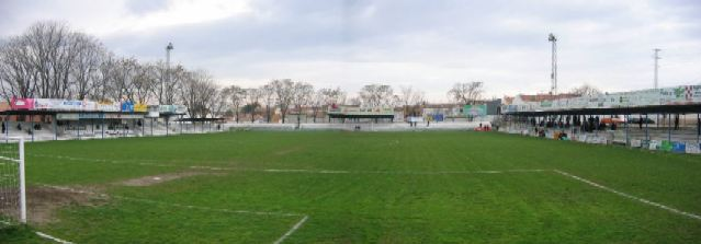 Estadio Municipal de Fútbol Ciudad de Martos (Anteriormente Chamorro Martínez).